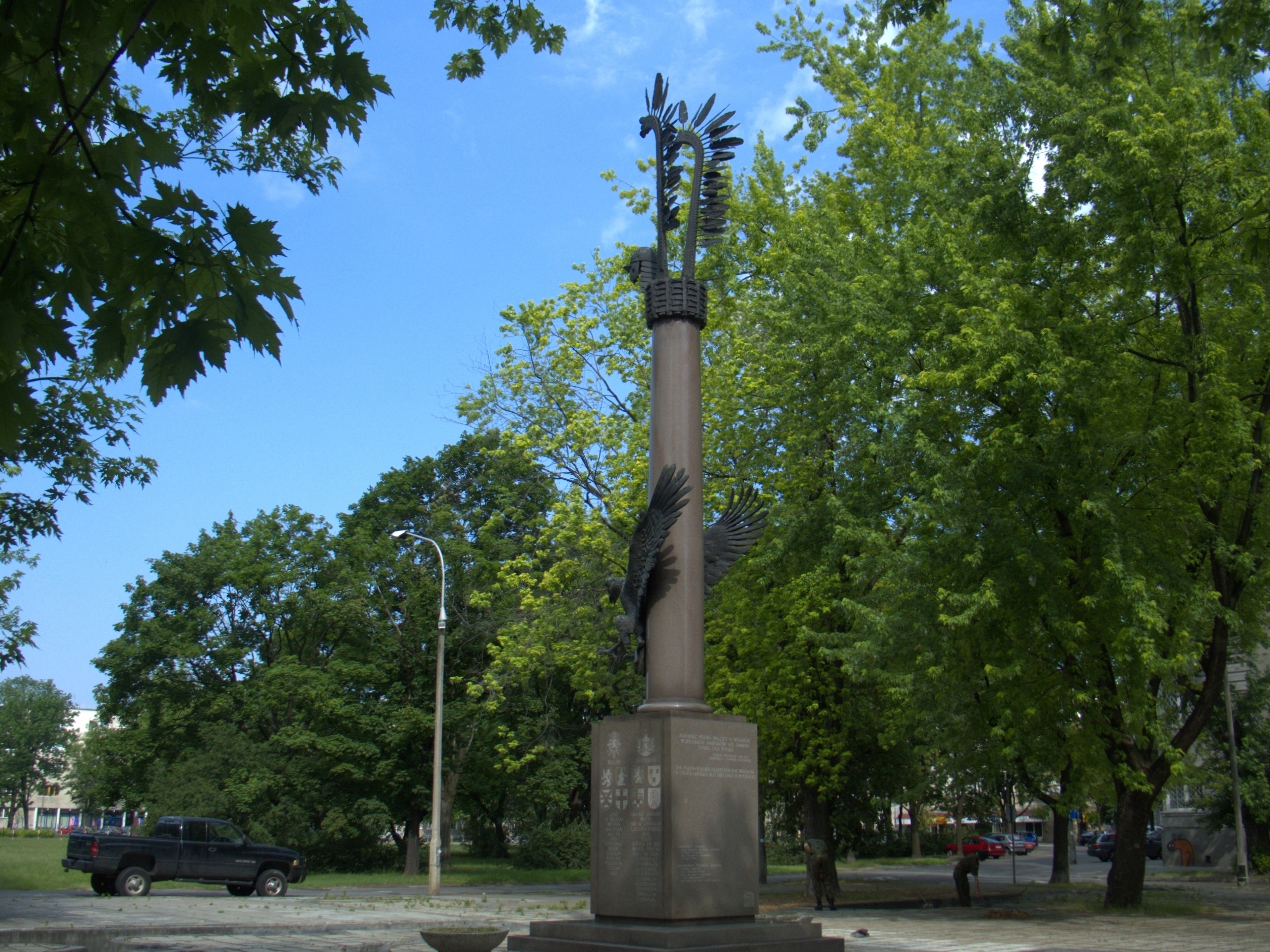 Plac Inwalidów w Warszawie - pomnik 2